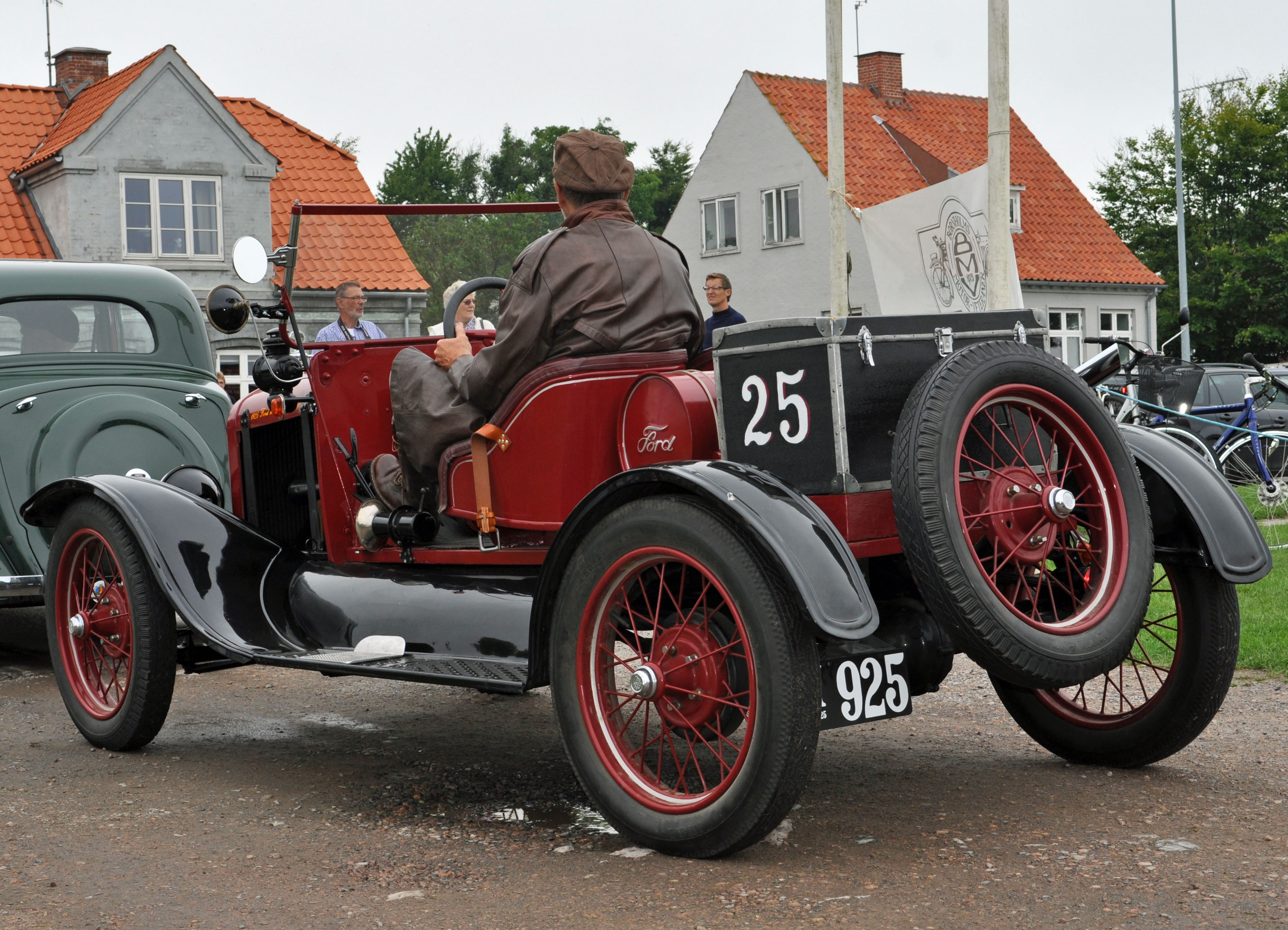 Das Foto zeigt einen Teilnehmer der Classic-Car-Race "Bornholm Rundt 2012" im Juli 2012 auf Bornholm, Dänemark. Ford